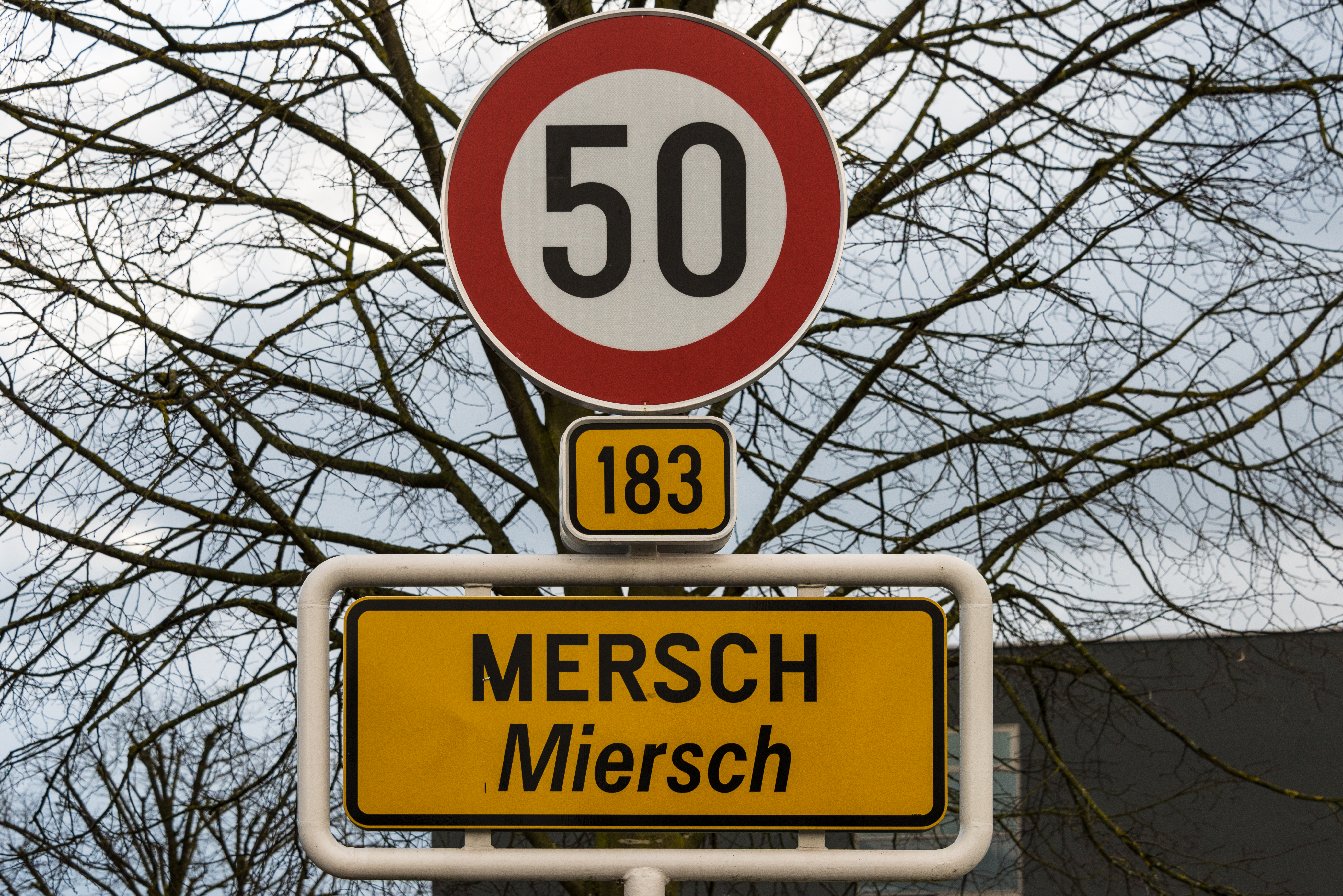 Schëld zu Miersch, rue de la Gare.